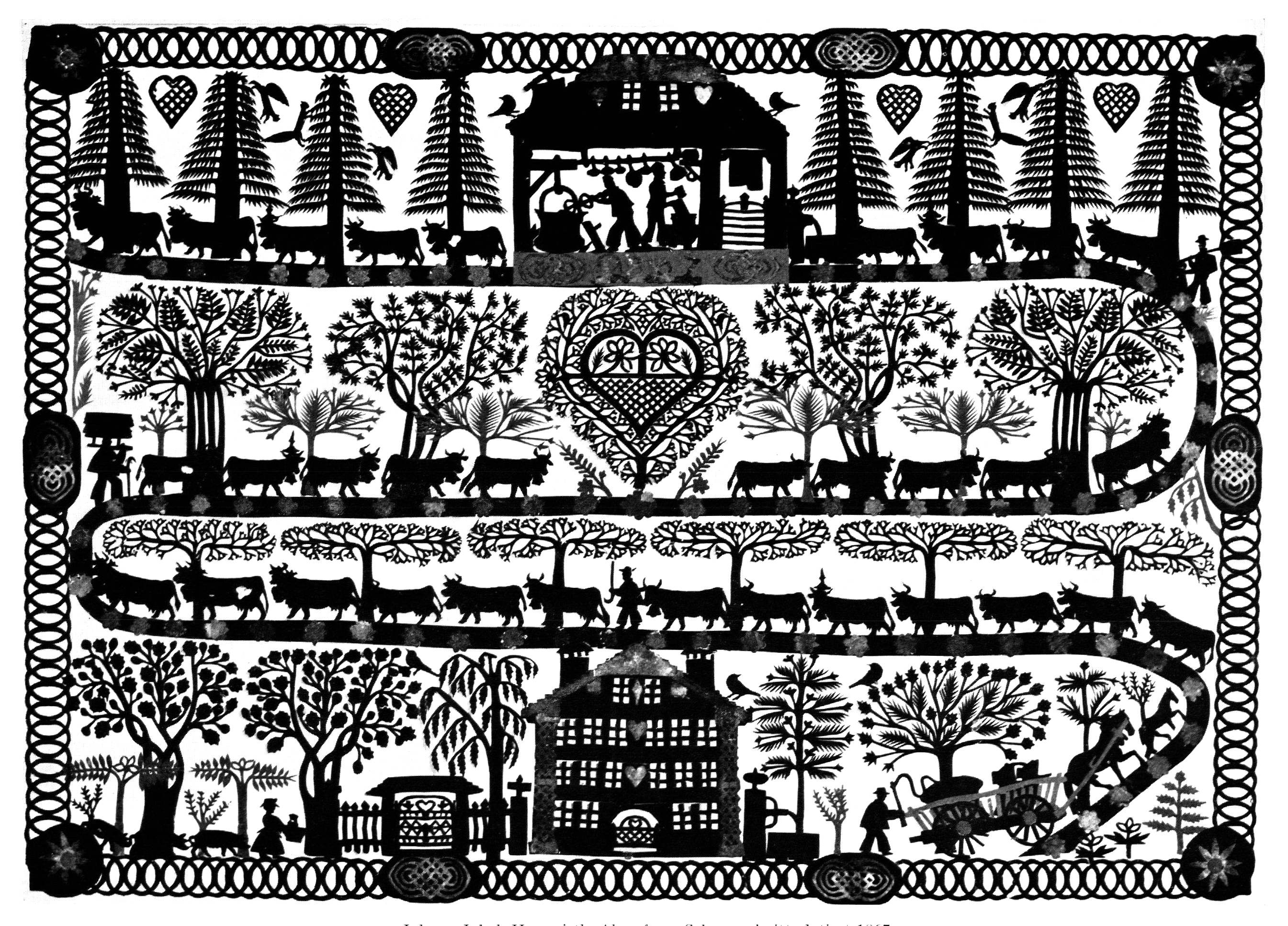 Scherenschnitt «Alpaufzug» von Johann Jakob Hauswirth